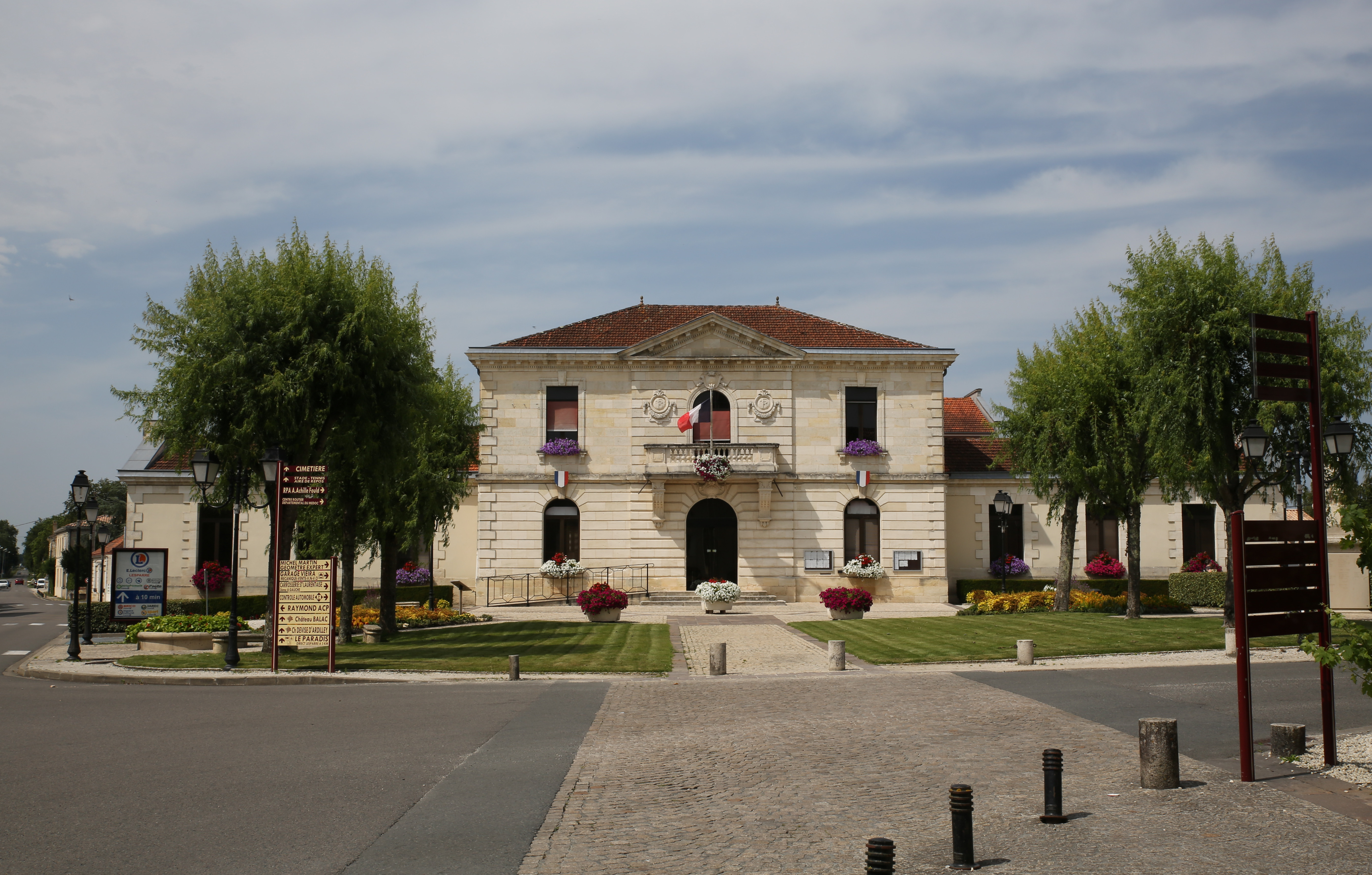 Mairie de Saint-Laurent-Médoc